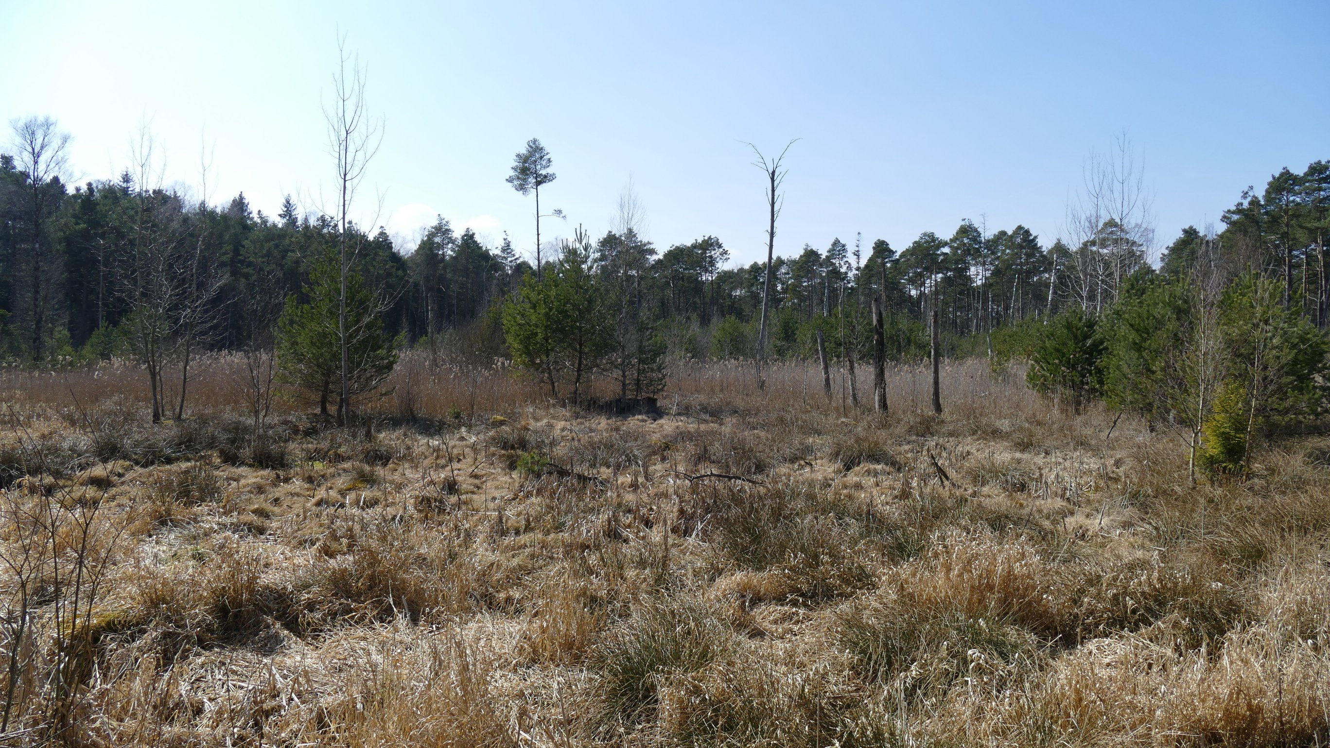 Rotfilz im Rotter Forst, Bayern